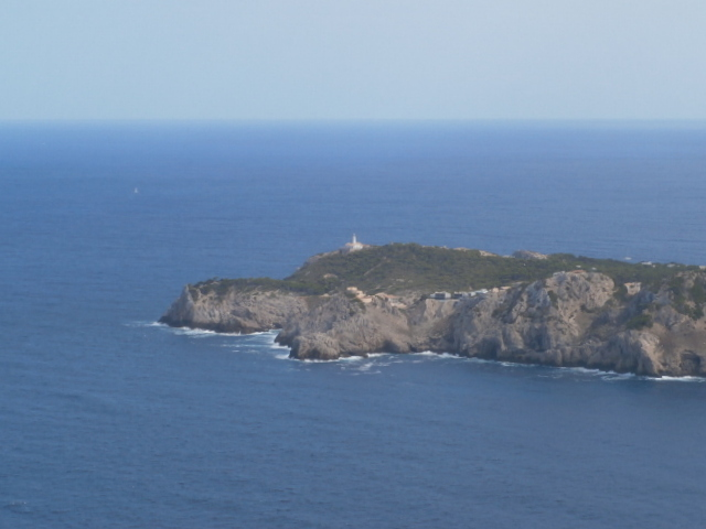 Far de Capdepera